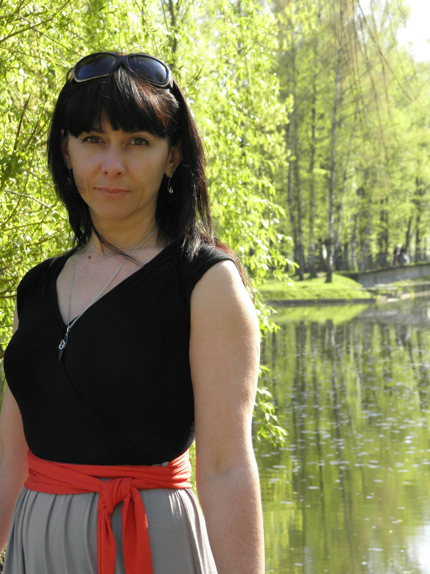 Віталія Савченко